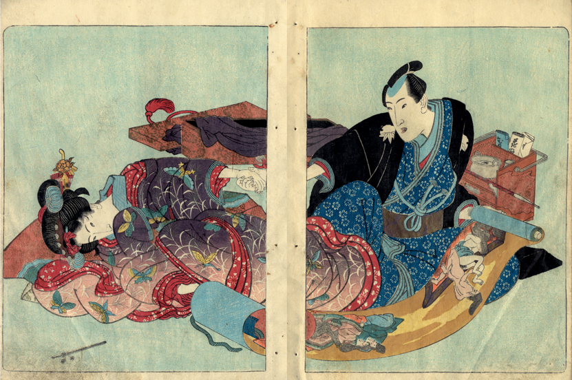 Utagawa Kunisada Shunka shuto shiki no nagame: Haru, Natsu, Aki, Fuyu no bu (Il canto delle quattro stagioni: Primavera, Estate, Autunno, Inverno). 1827 c. Obon. Nishiki-e con karazuri. Collezione Museo delle Culture.